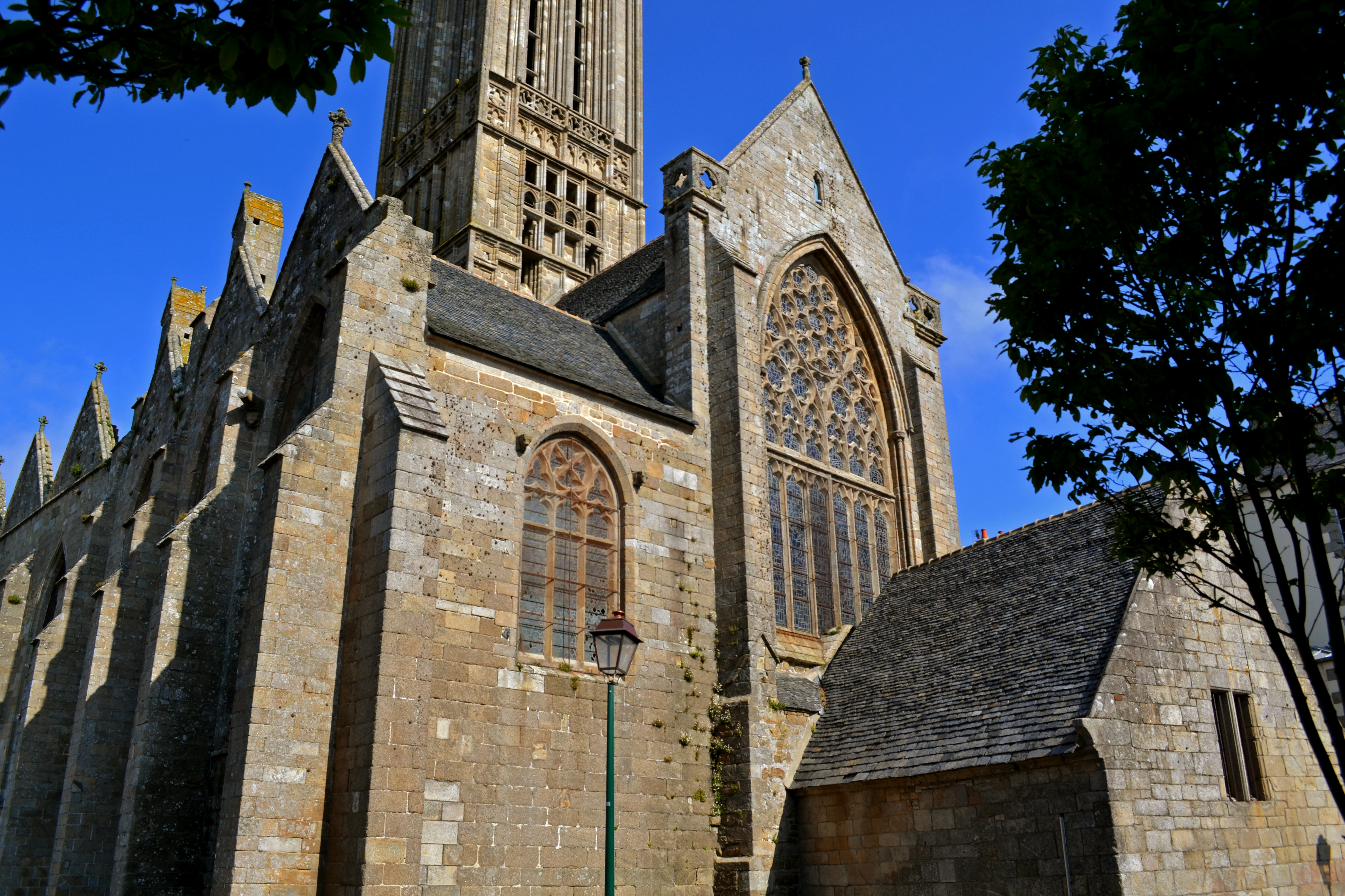 Côté Est de la chapelle du Kreisker à Saint-Pol-de-Leon dans le Finistère.